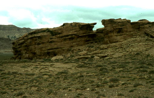 Site des gravures préhistoriques de Ben Srour, Wilaya de M'Sila, Algérie